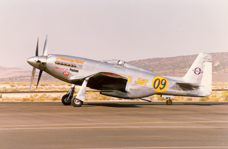 Reno88-3